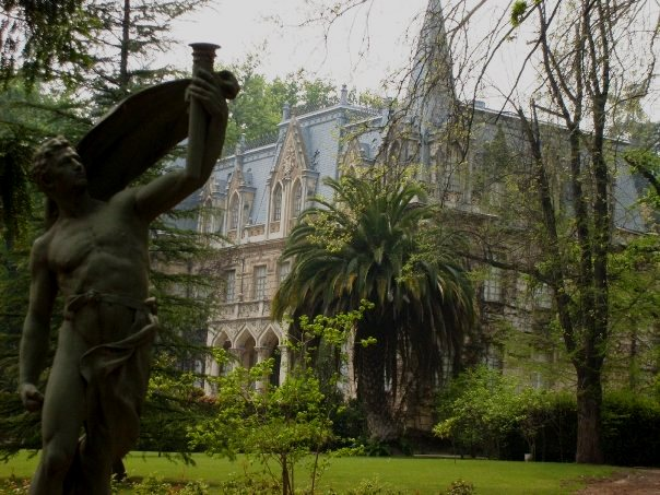 Castillo Las Madas de Pirque